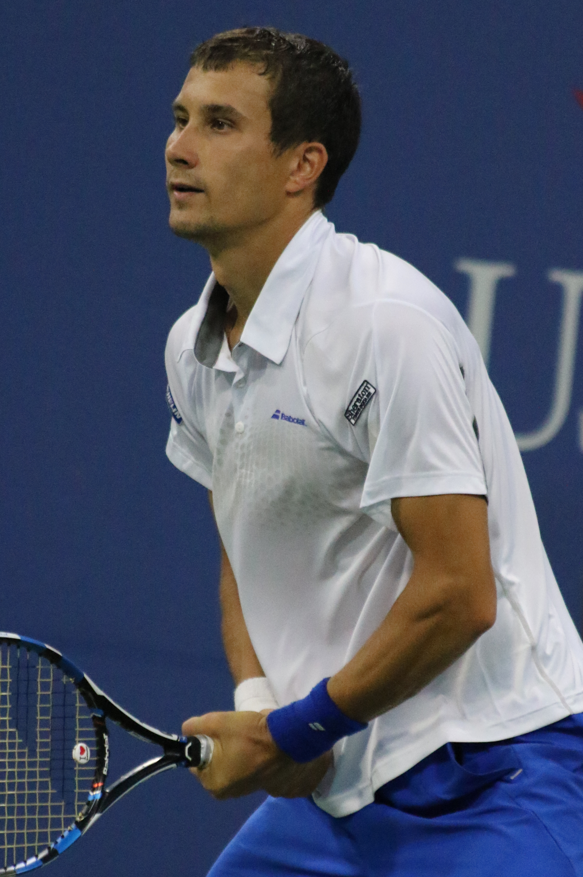 Donskoy US16 (17)